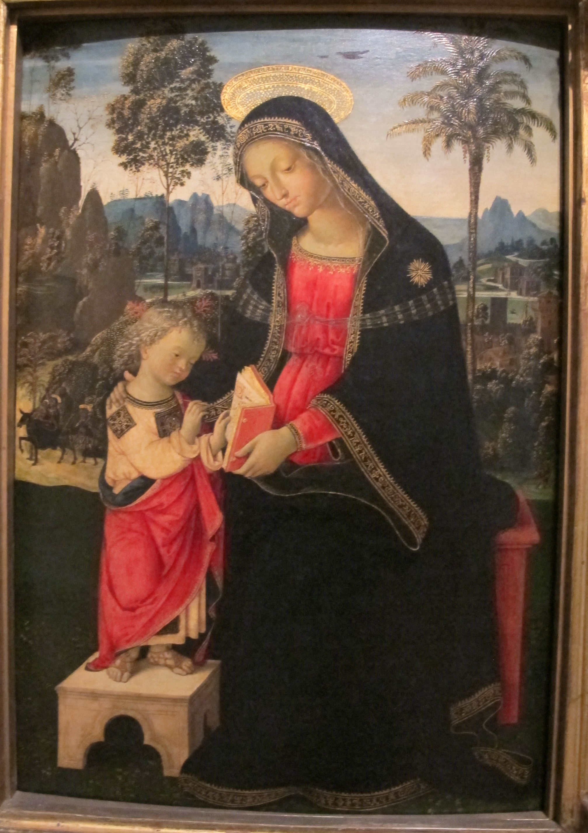 Philadelphia Museum of Art